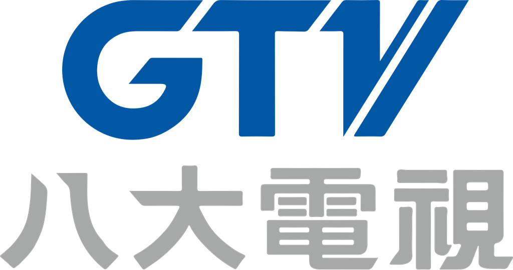 八大電視2011年版商標。